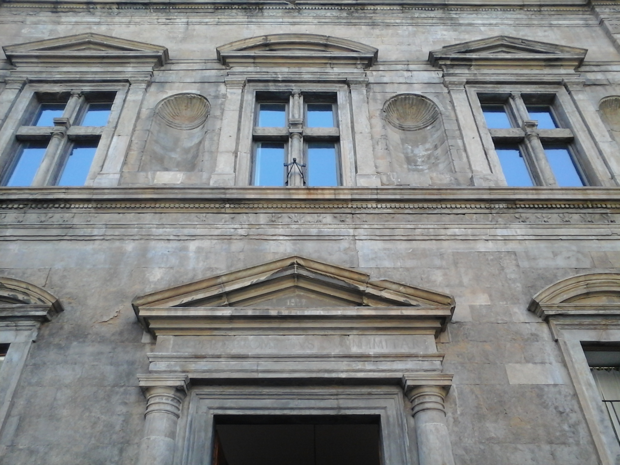 Palazzo bartolini Salimbeni, Firenze